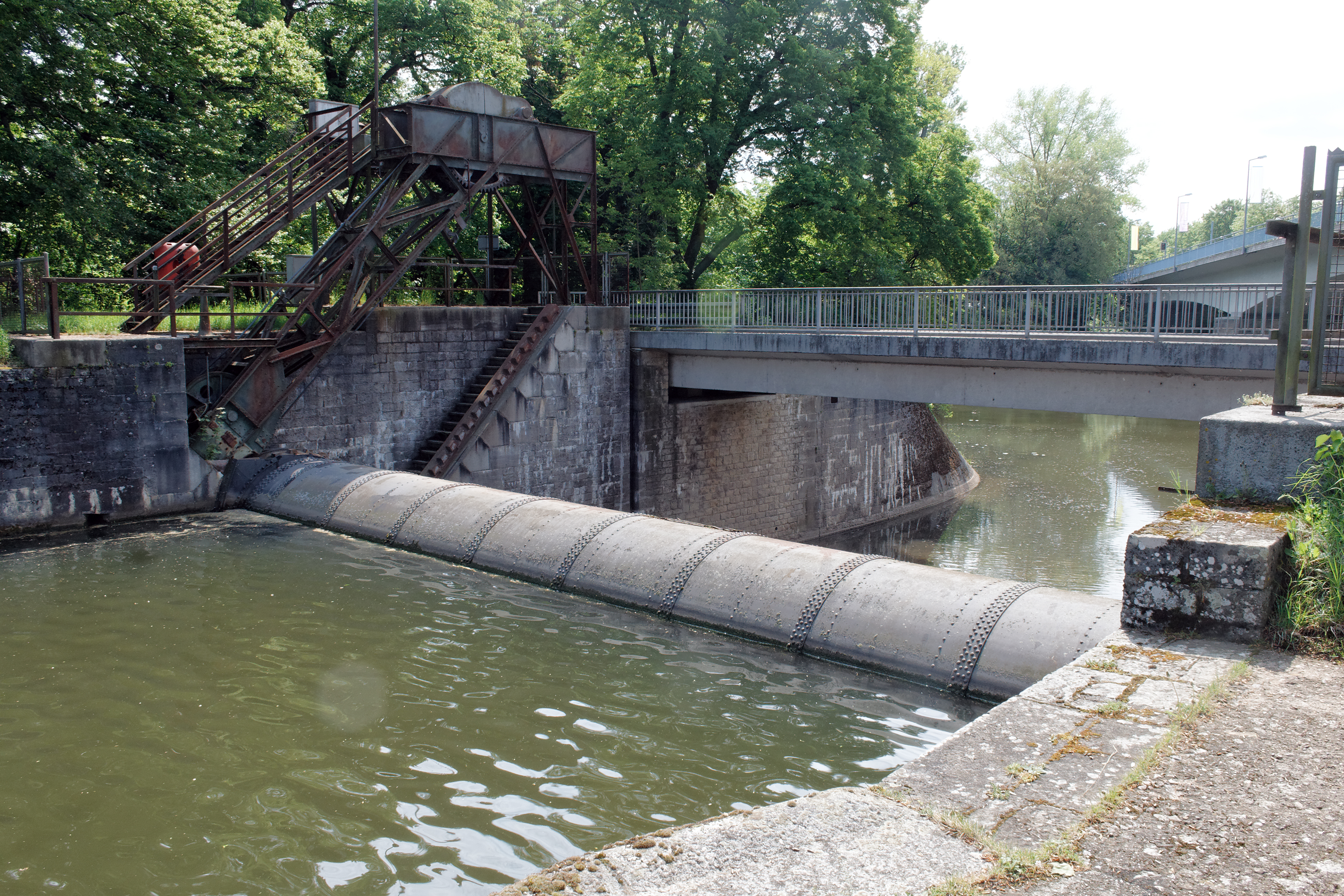 Walzenwehr am Grundablass des Mains bei Schweinfurt, erbaut 1902.